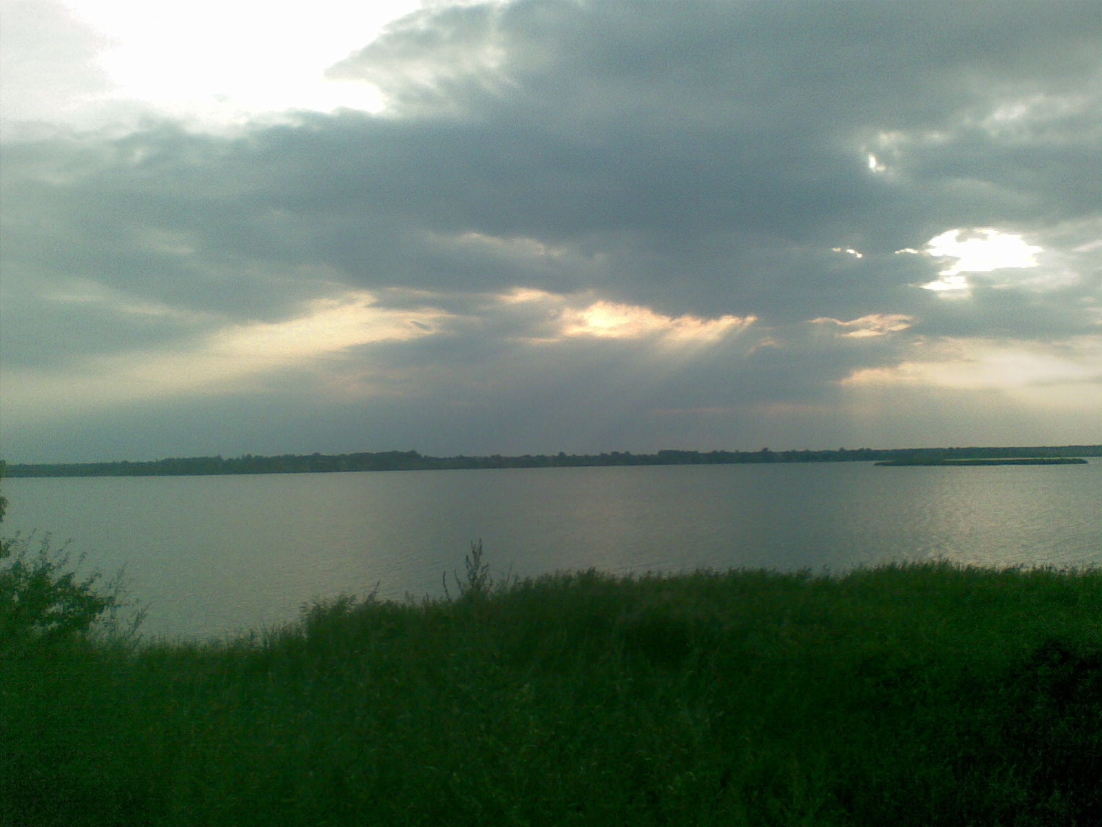 Річка Супій у вечірніх сутінках. м. Яготин